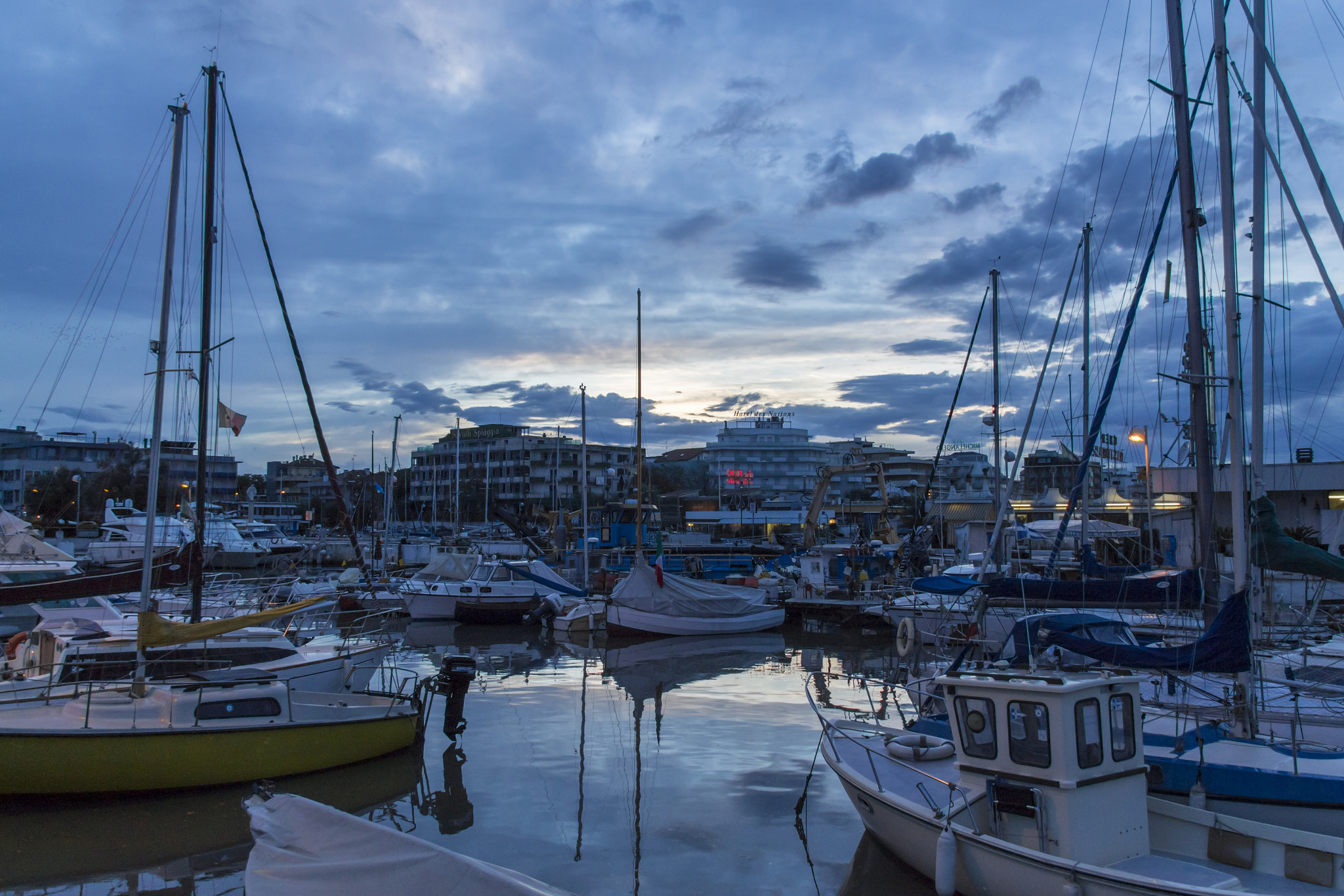 Il porto di Riccione nell'ora blu